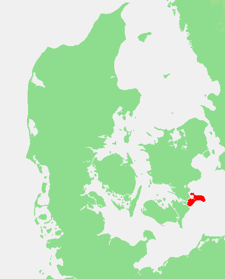 DK - Mon.PNG